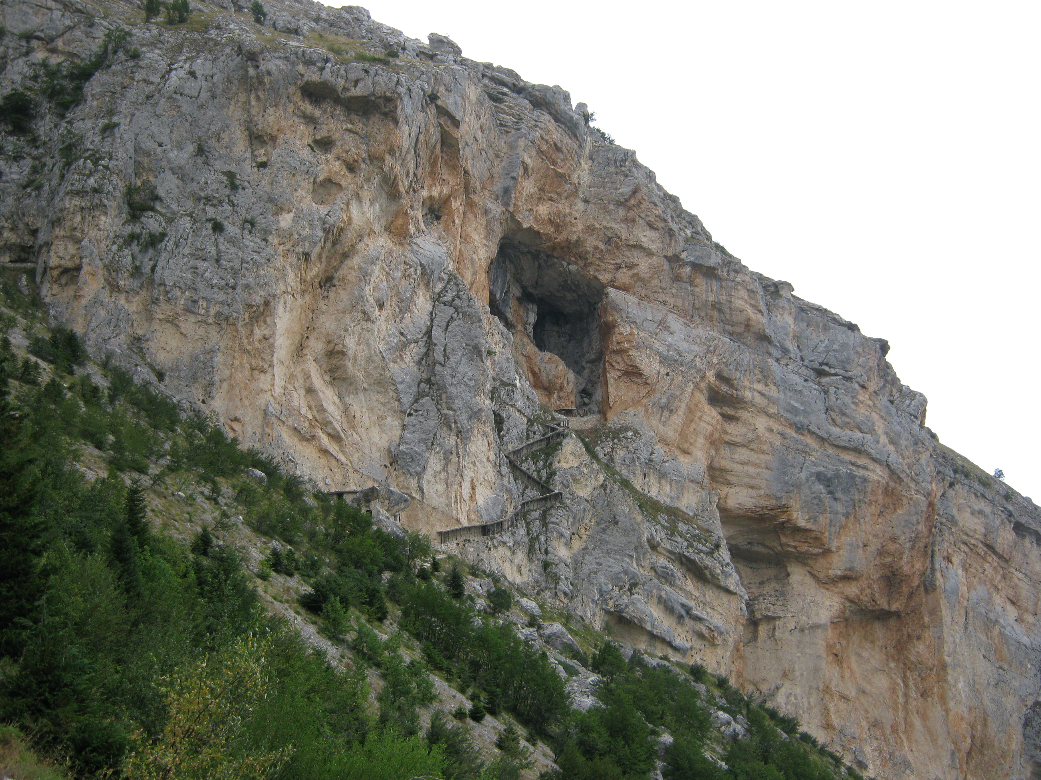 Ingresso Grotta del Cavallone, Abruzzo